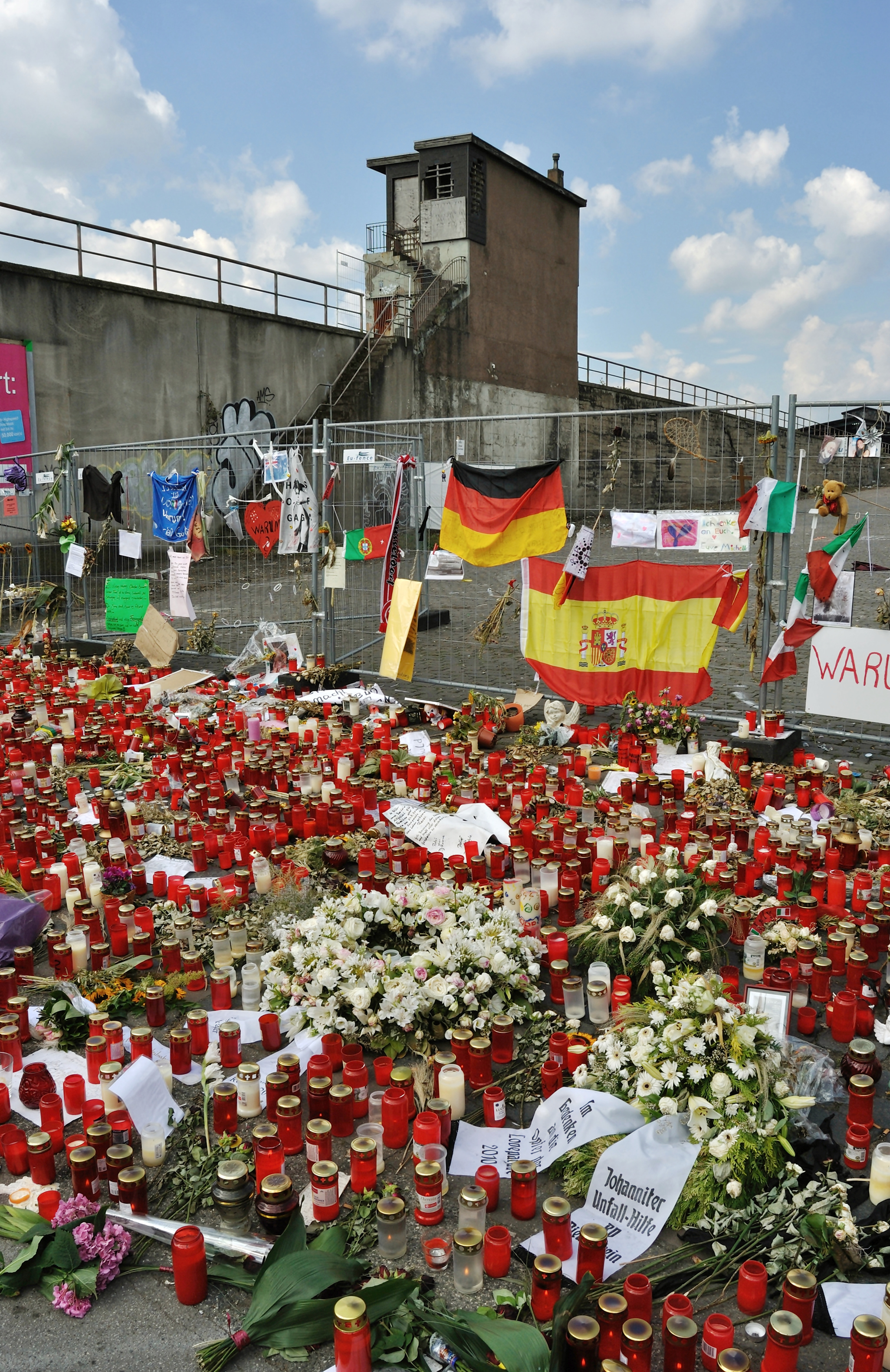 Die östliche Rampe des alten Duisburger Güterbahnhofes, auf welcher sich das Loveparade-Unglück im Juli 2010 ereignet hatte, zehn Tage nach dem Vorfall. Rechts sieht man die eigentliche gesperrte Treppe, über welche sich Massen aus dem Gedränge auf das Festivalgelände retten wollten; bei dieses Versuchen wurden viele Leute verletzt und wahrscheinlich auch getötet. Am Sperrzaun, welcher den Zugang zur Rampe des noch komplett gesperrten Güterbahnhofes verhindert, sind viele Trauerplakate und Fahnen, die Länder repräsentieren, aus welchen Todesopfer stammen, befestigt. Unzählige Kränze, Blumen, Kerzen und sonstige Andenken wurden vor dem Zaun niedergelegt.